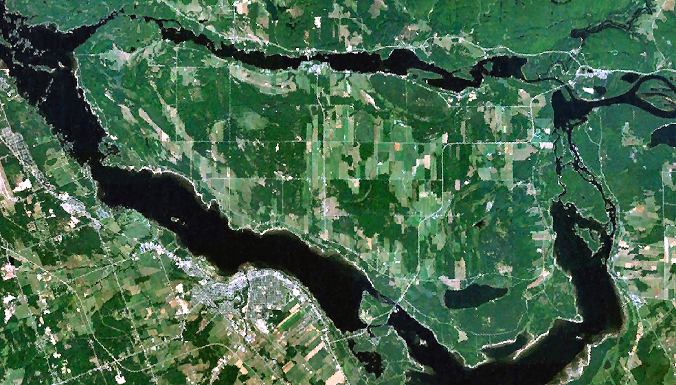 Satellite photo of L'Isle-aux-Allumettes, Quebec.